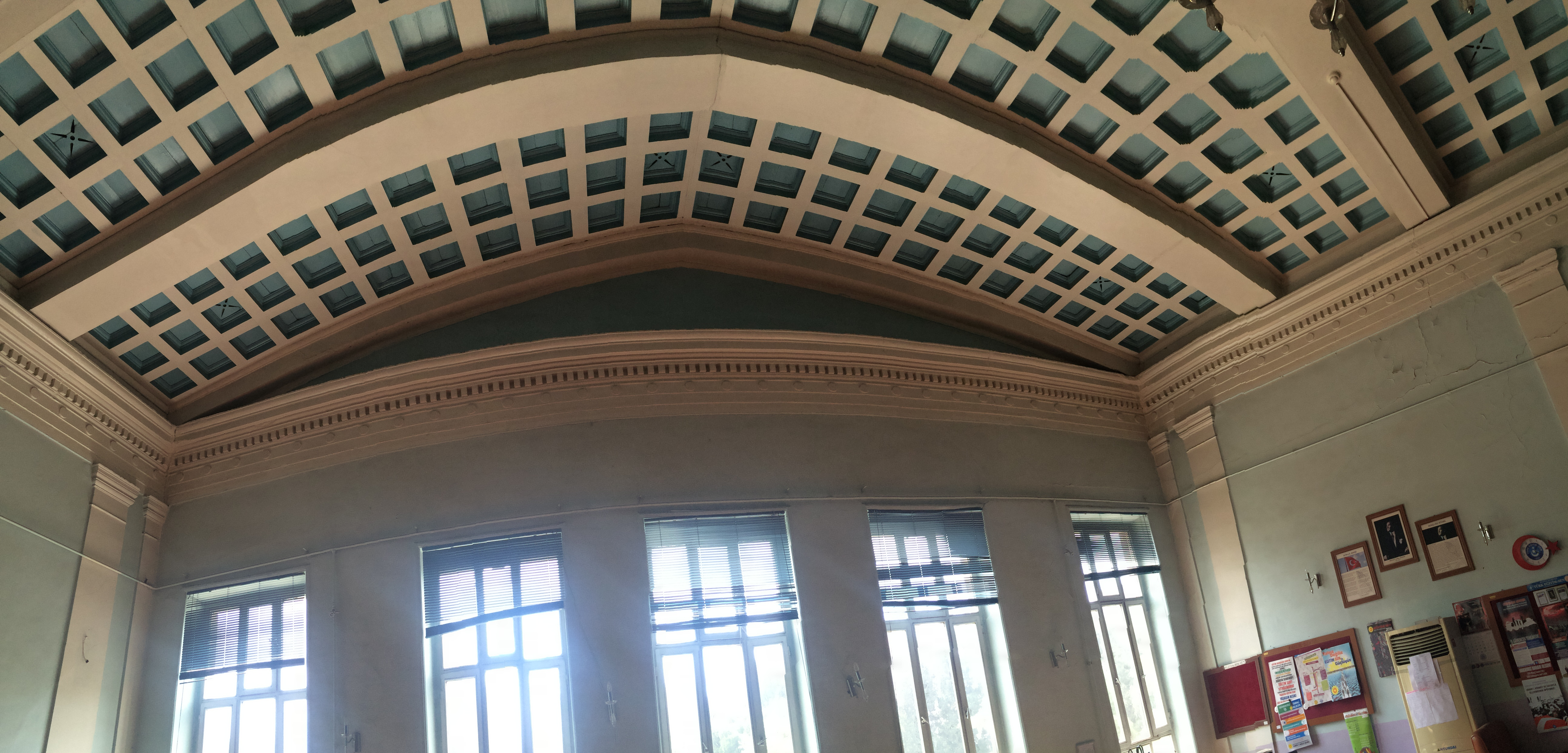 Tavan Süslemesi Detayı